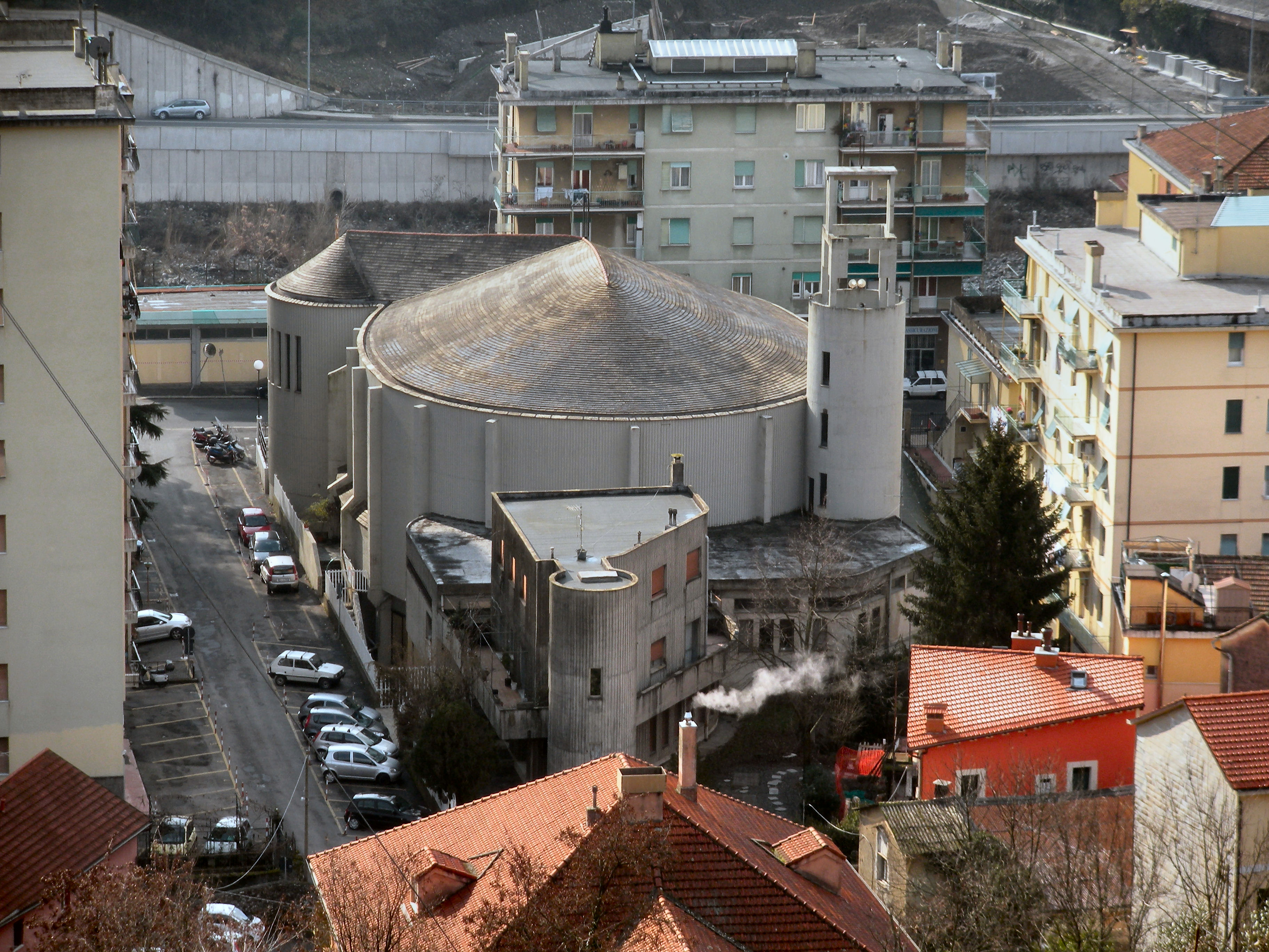 La chiesa dei Santi Cosama e Damiano a Prato (Genova)